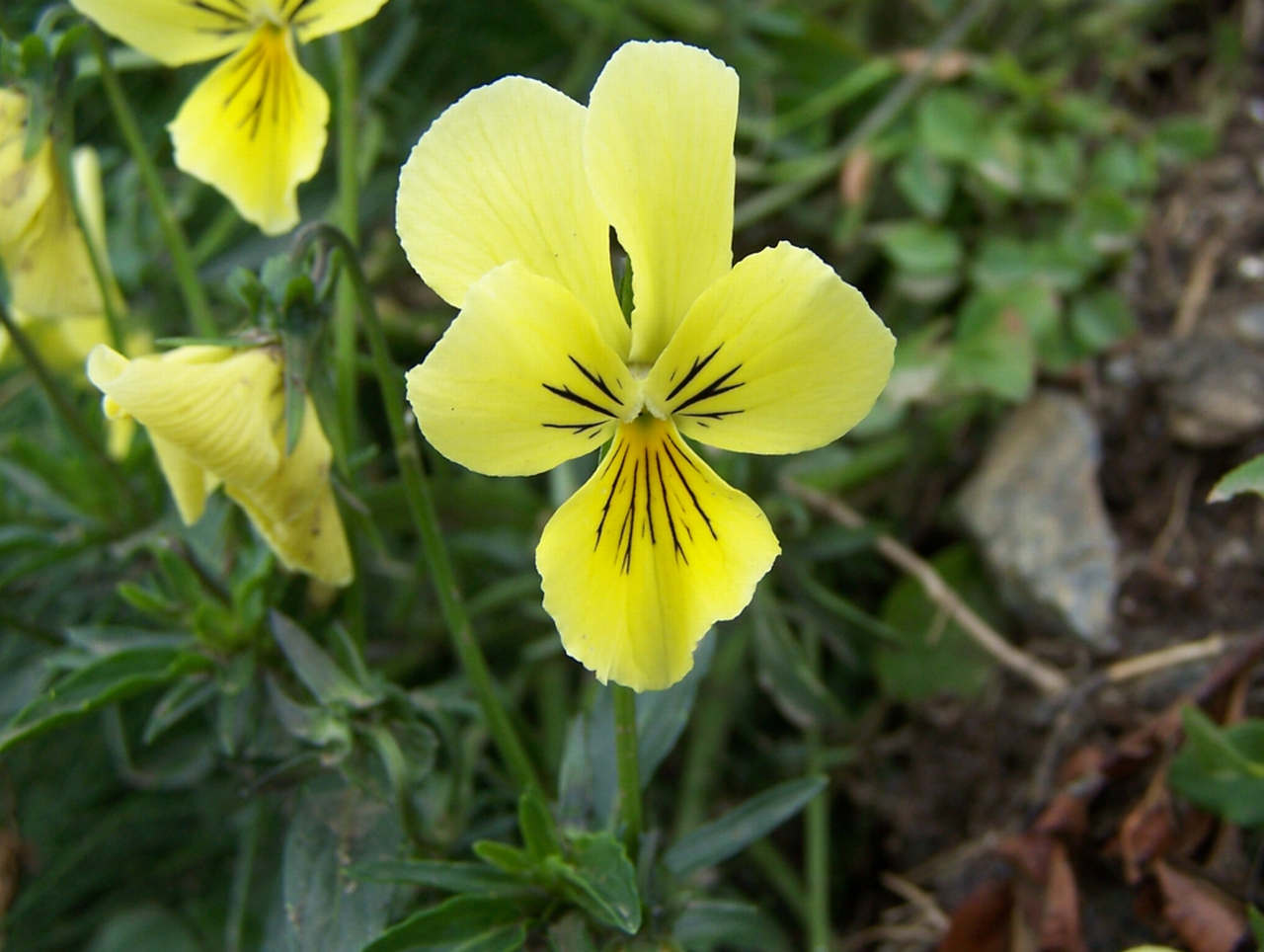 Viola lutea subsp. sudetica (pl. fiołek żółty sudecki), habitat: Tatra Mountains,Goryczkowa Czuba